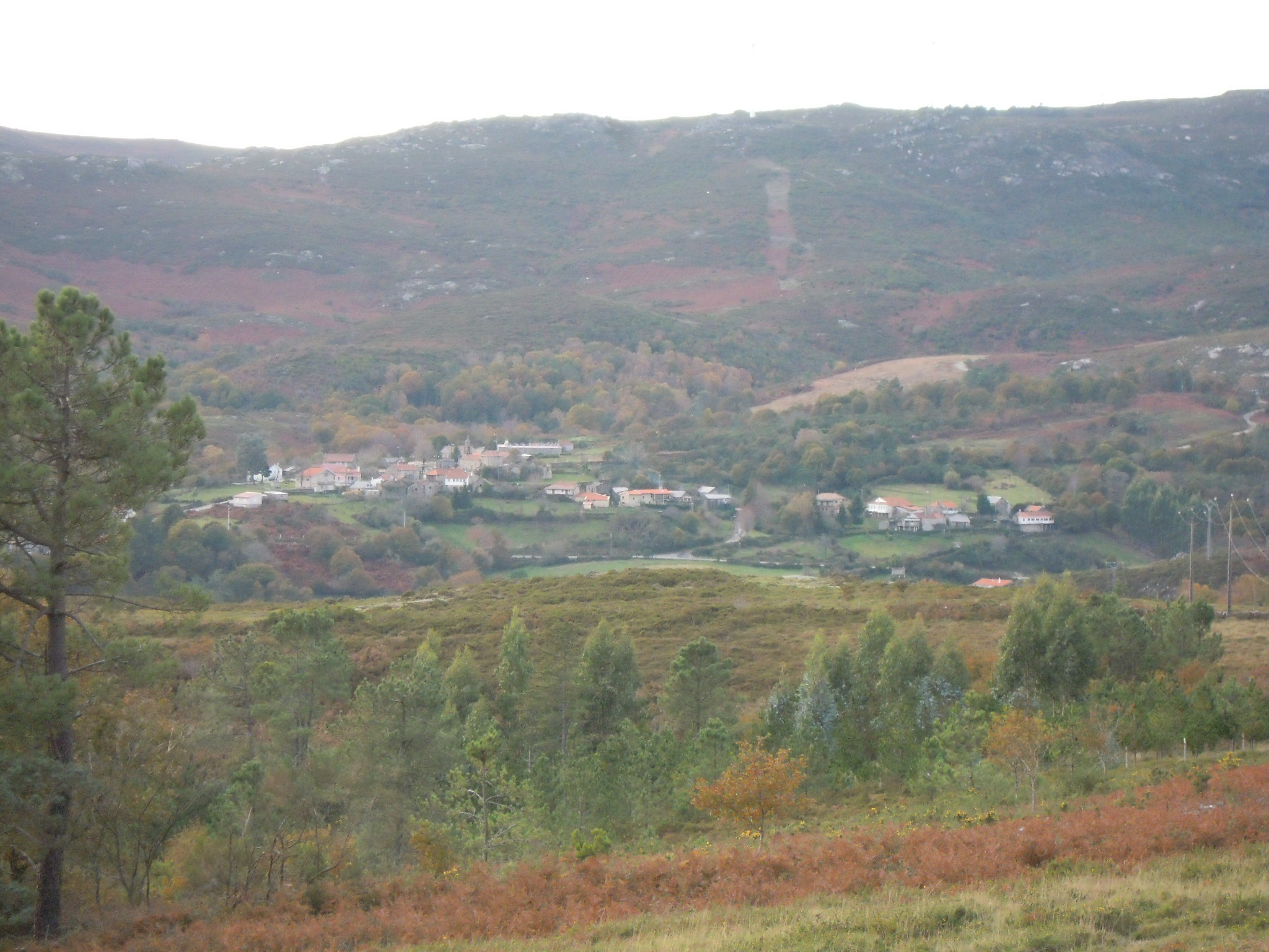 Vista xeral do lugar da Barcia (A Barcia do Seixo, A Lama). Imaxe tirada desde o alto de Portela da Cruz, entre os concellos da Lama e Beariz.